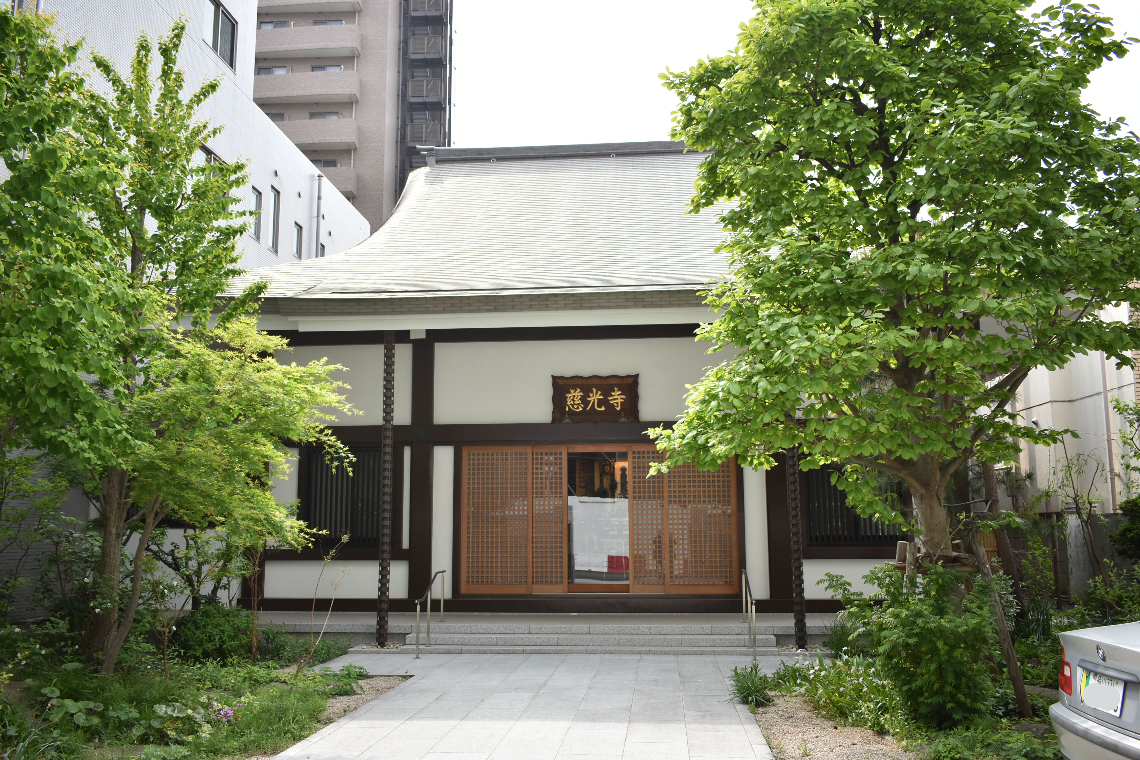 千駄ヶ谷 慈光寺 Nikon D3400